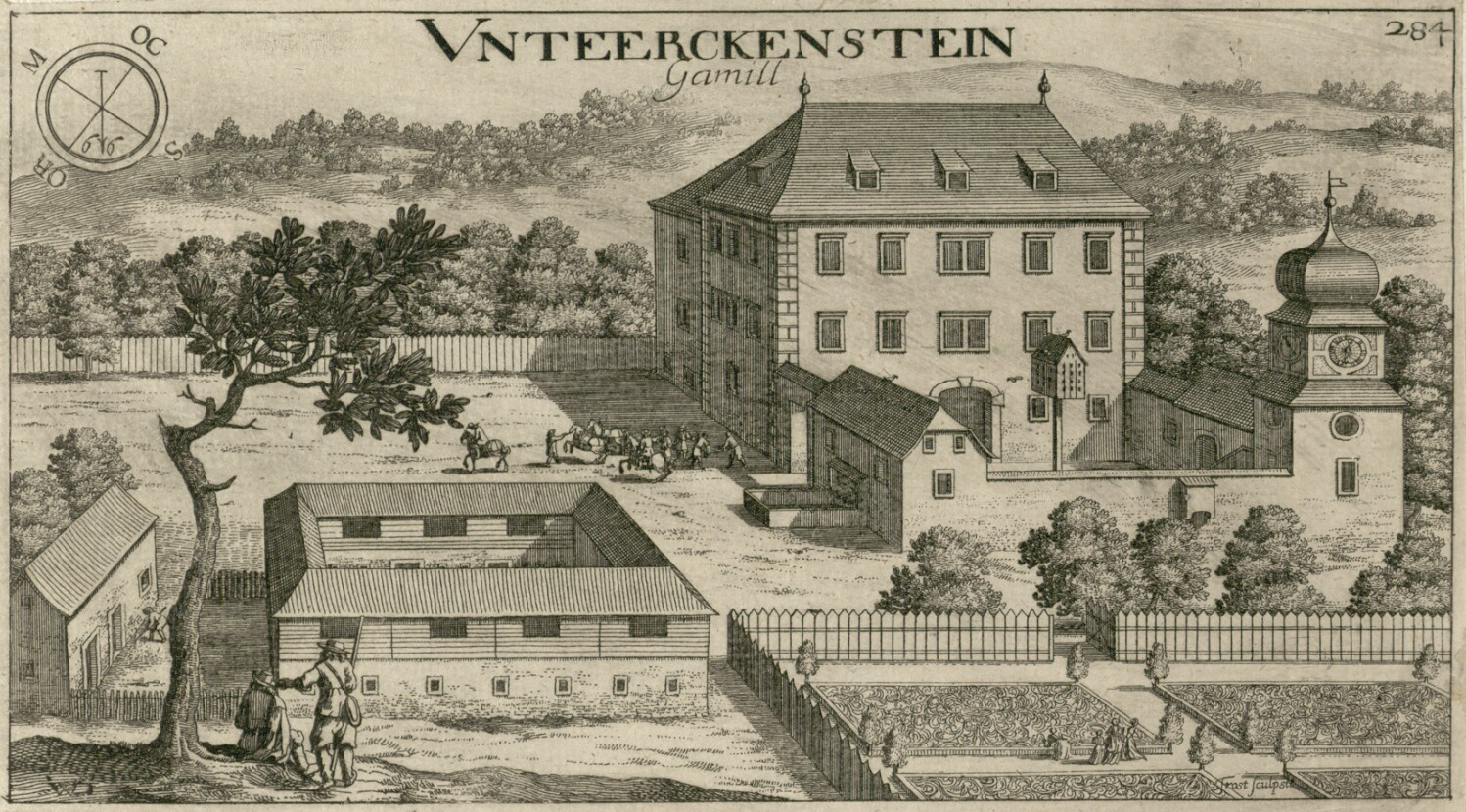 Dvorec Gomila (Unteerckenstein)